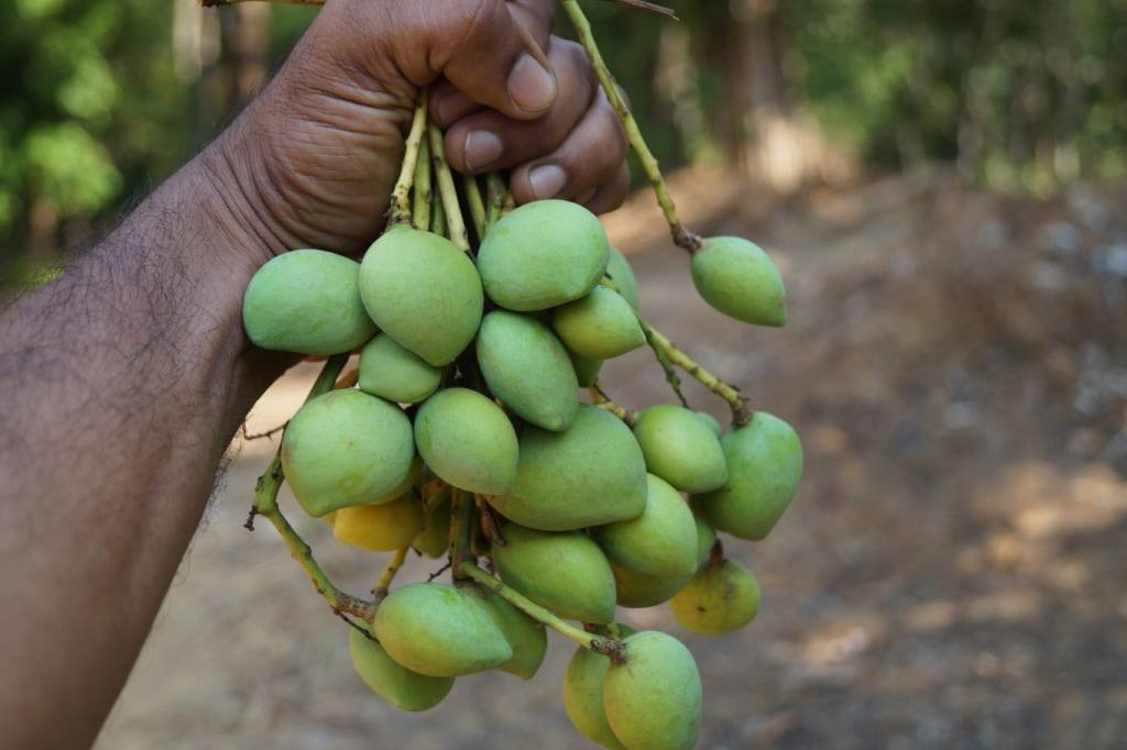 ಕನ್ನಡ: ಒಂದು ಜಾತಿಯ ಅಪ್ಪೆಮಿಡಿ